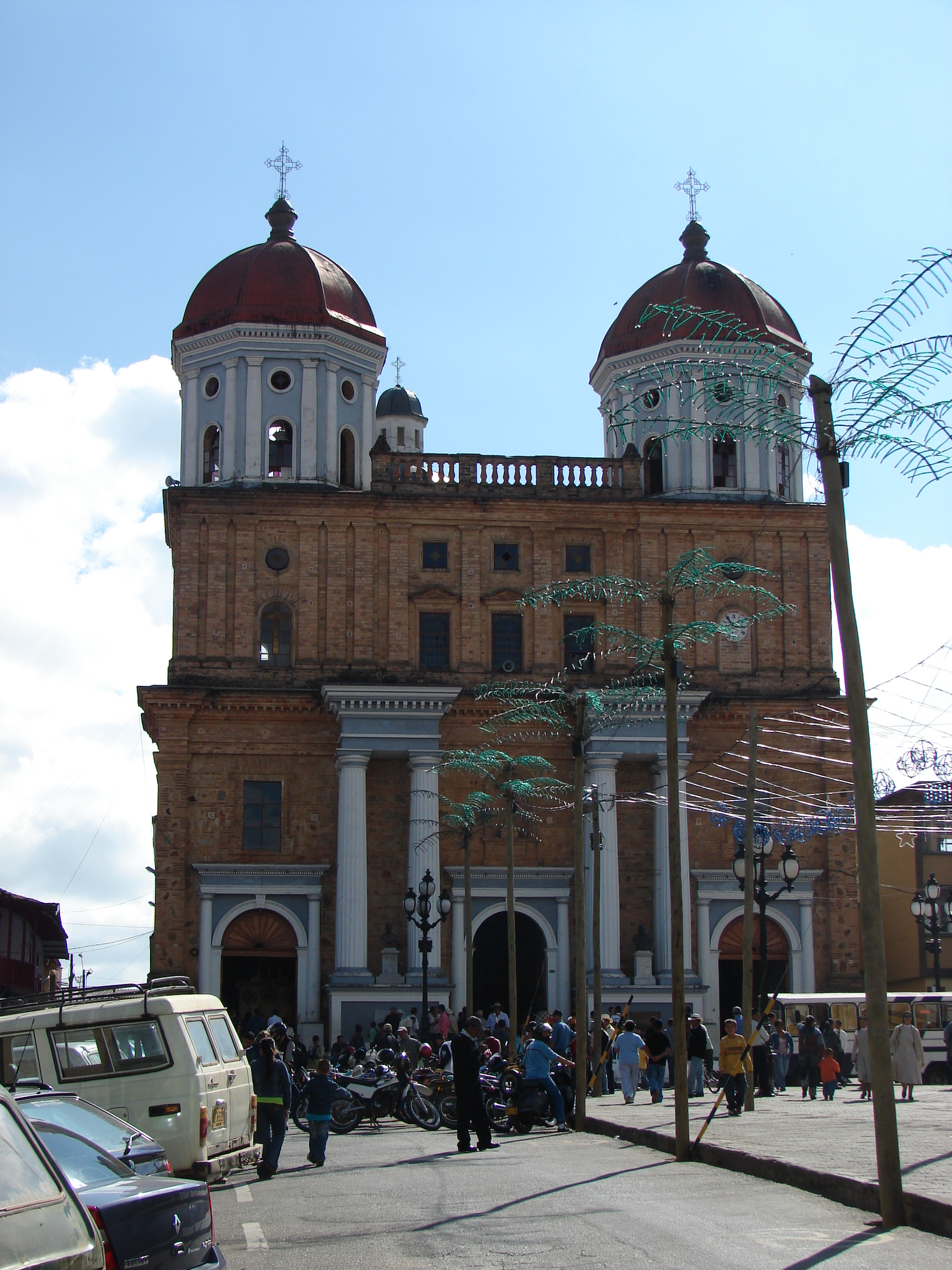 Fachada de la Catedral del Municipio de Santa Rosa de Osos. Antioquia, Colombia.